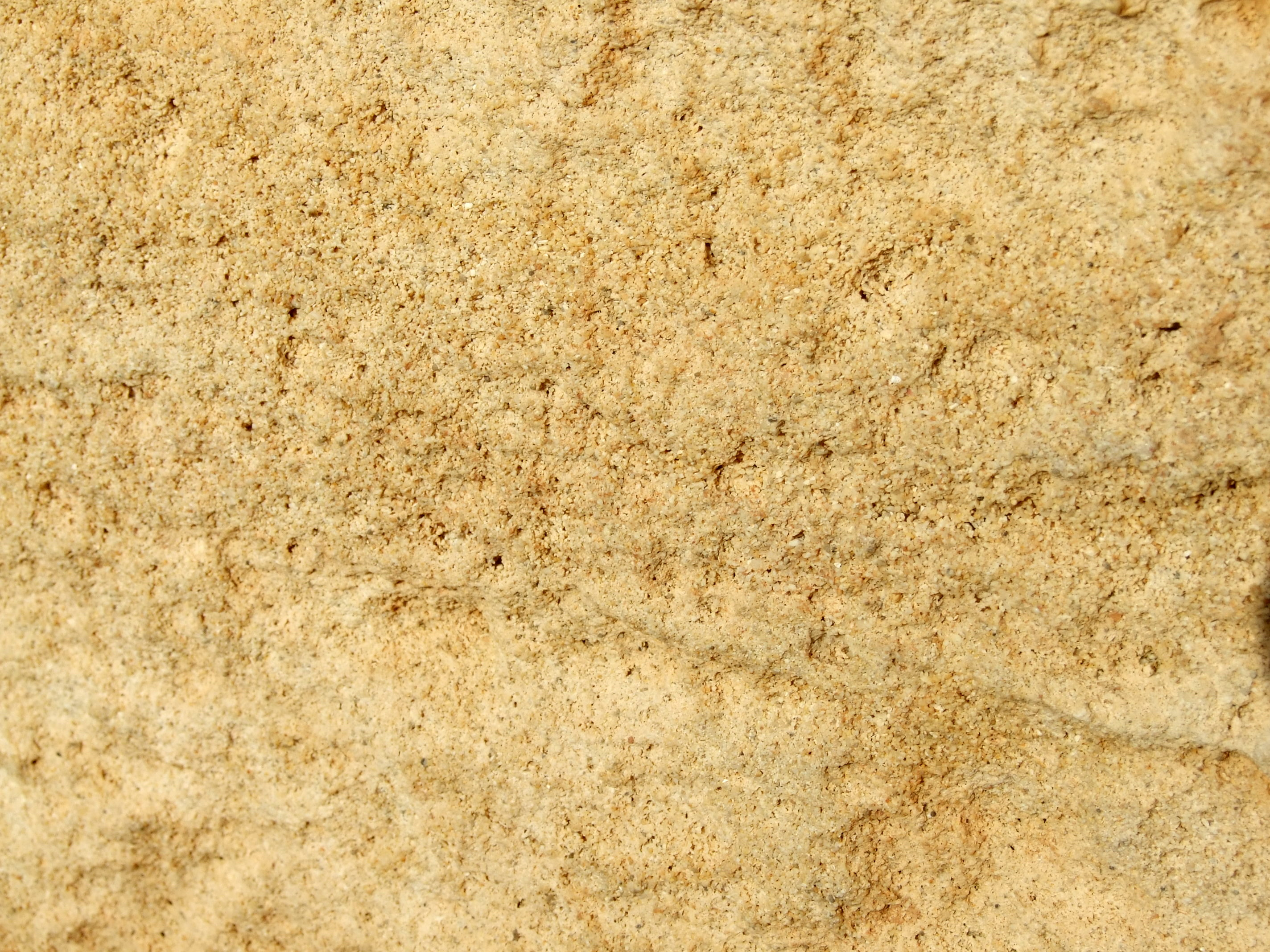 Frische Oberfläche von Marès